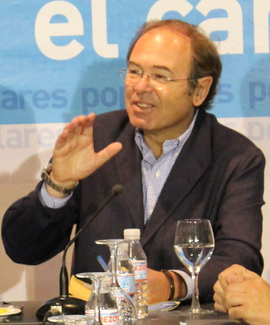 El portavoz del PP en el Senado, Pío García Escudero, ha mantenido una reunión de trabajo con la candidatura del PP de San Fernando, encabezada por José Loaiza.